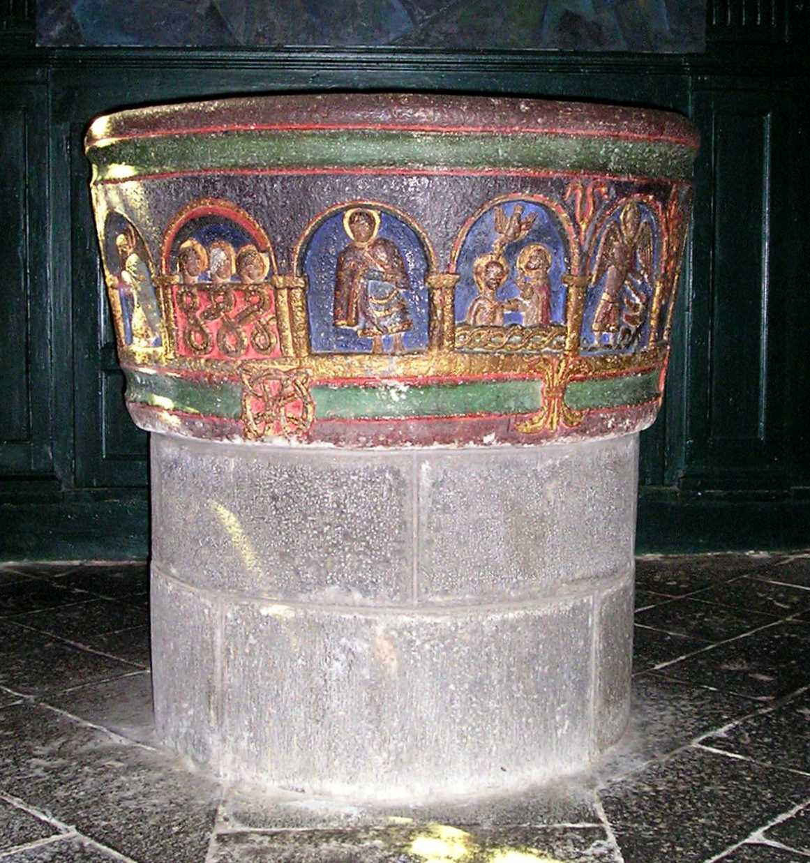 Mauriac_Notre_Dame_Taufbecken